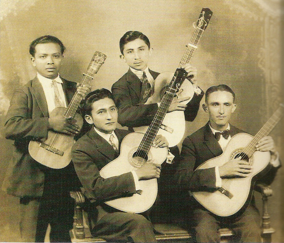 Escaneo de fotografía exhibida pública y permanentemente en el Museo de la Canción Yucateca en Mérida Yucatán México